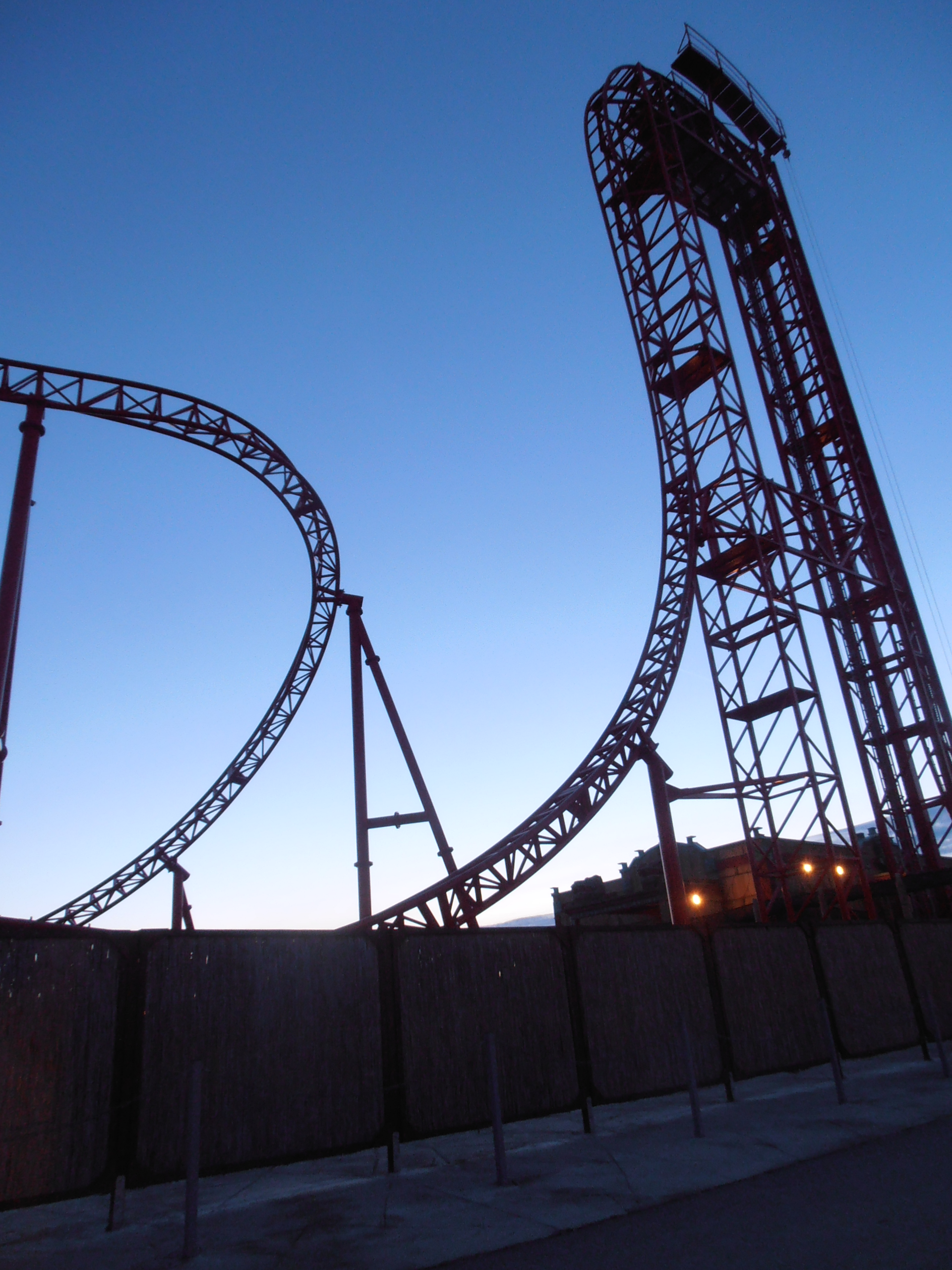 Die Achterbahn Huracan im Freizeitpark Belantis 2012